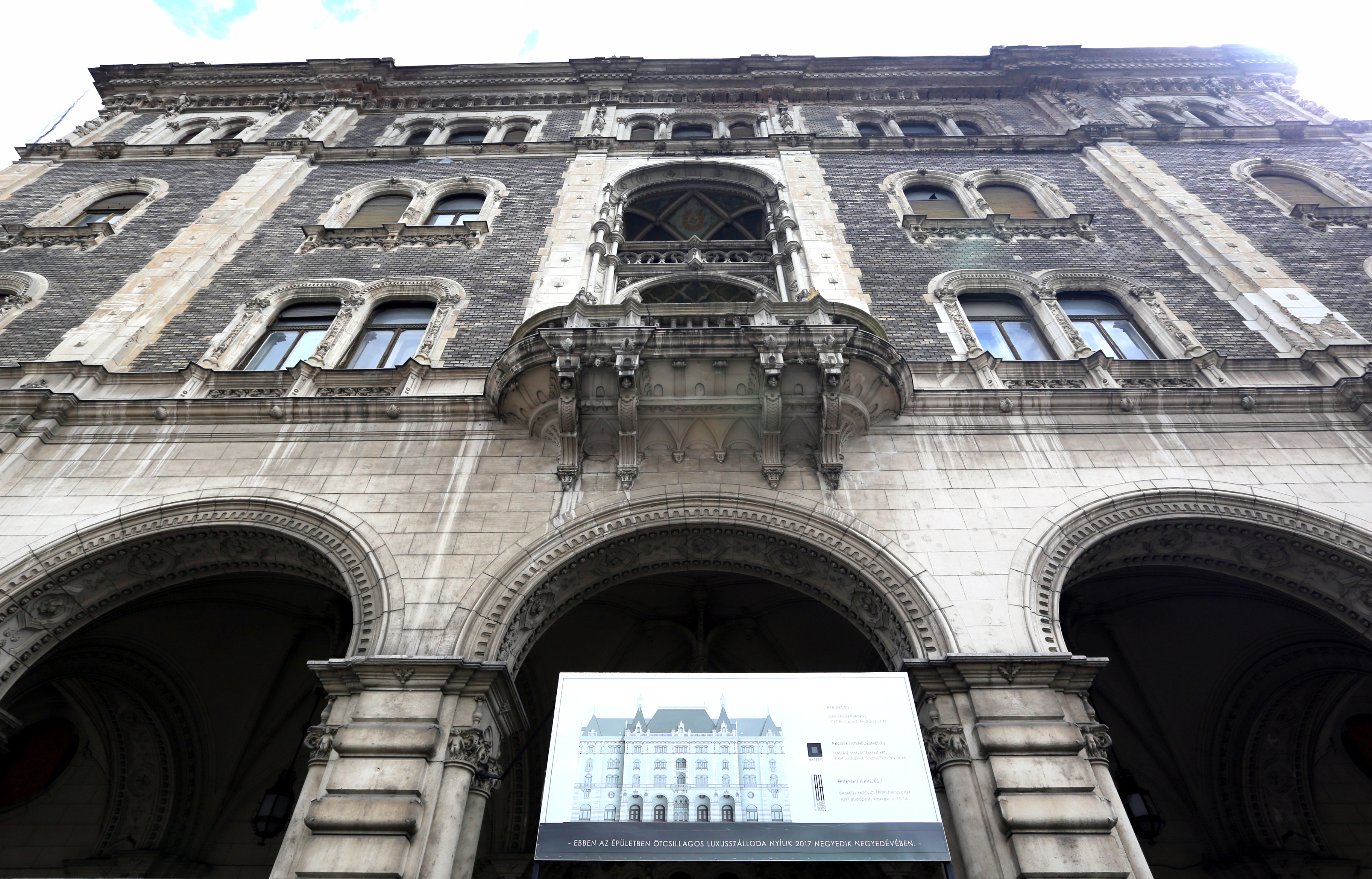 Andrássy út 25, a Drechsler-palota homlokzata, a Magyar Táncművészeti Főiskola egykori épülete.